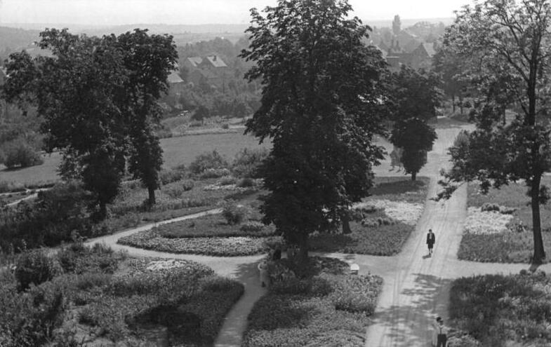 Erfurt, Kulturpark auf der Cyriaksburg Zentralbild Wlocker-Wittig 14.8.1953 Str.-Ho. Kulturpark auf der Cyriaksburg in Erfurt. UBz: Blick auf die Sommerblumen-Schau vom Turm der Cyriaksburg.